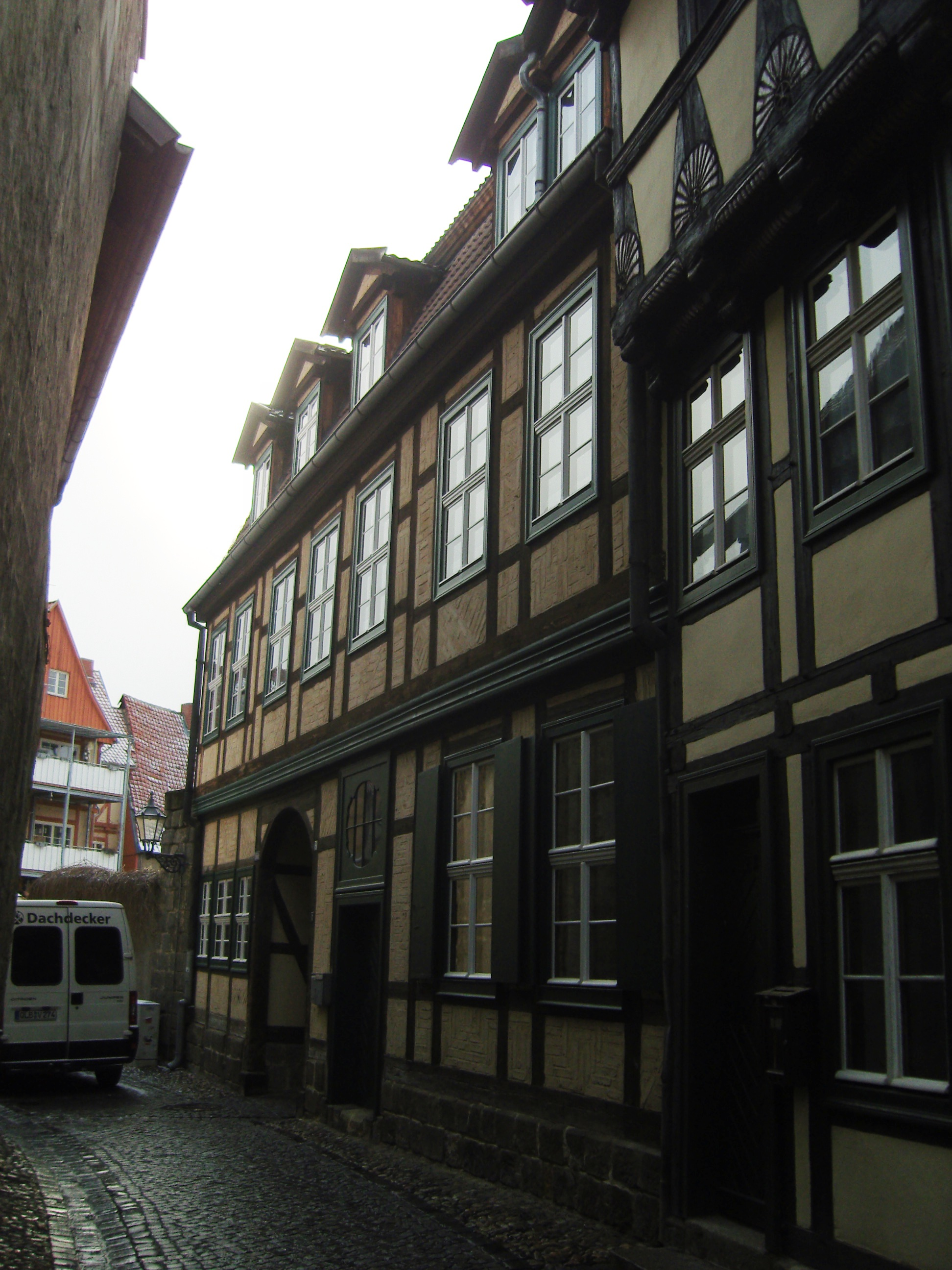 Denkmalgeschütztes Wohnhaus in der Straße Hölle 1 in Quedlinburg; mit Zugang zum Schuhhof